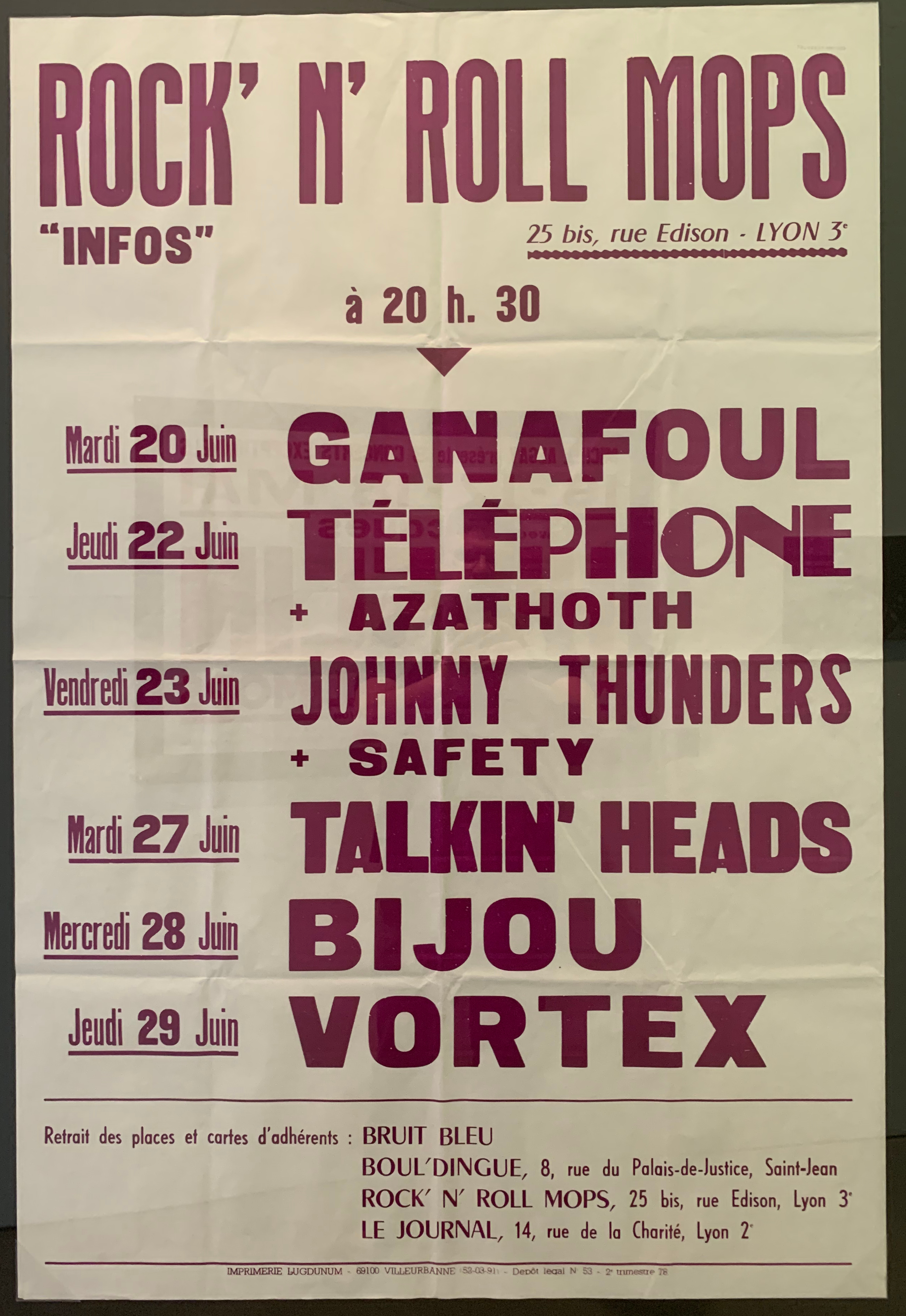 Affiche de concert Rock n' roll Mops à Lyon (Lyon capitale du rock - 1978-1983).